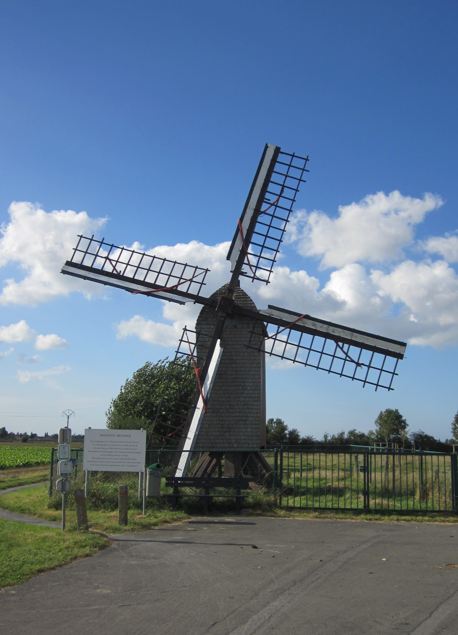 Molentje Decroos, Palinghoekstraat 8 Eggewaartskapelle (Veurne)